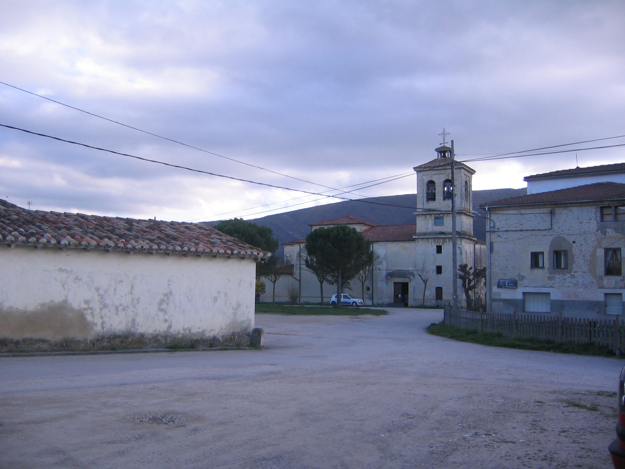 Iglesia de San Pedro y San Pablo en Nofuentes, Burgos (España).